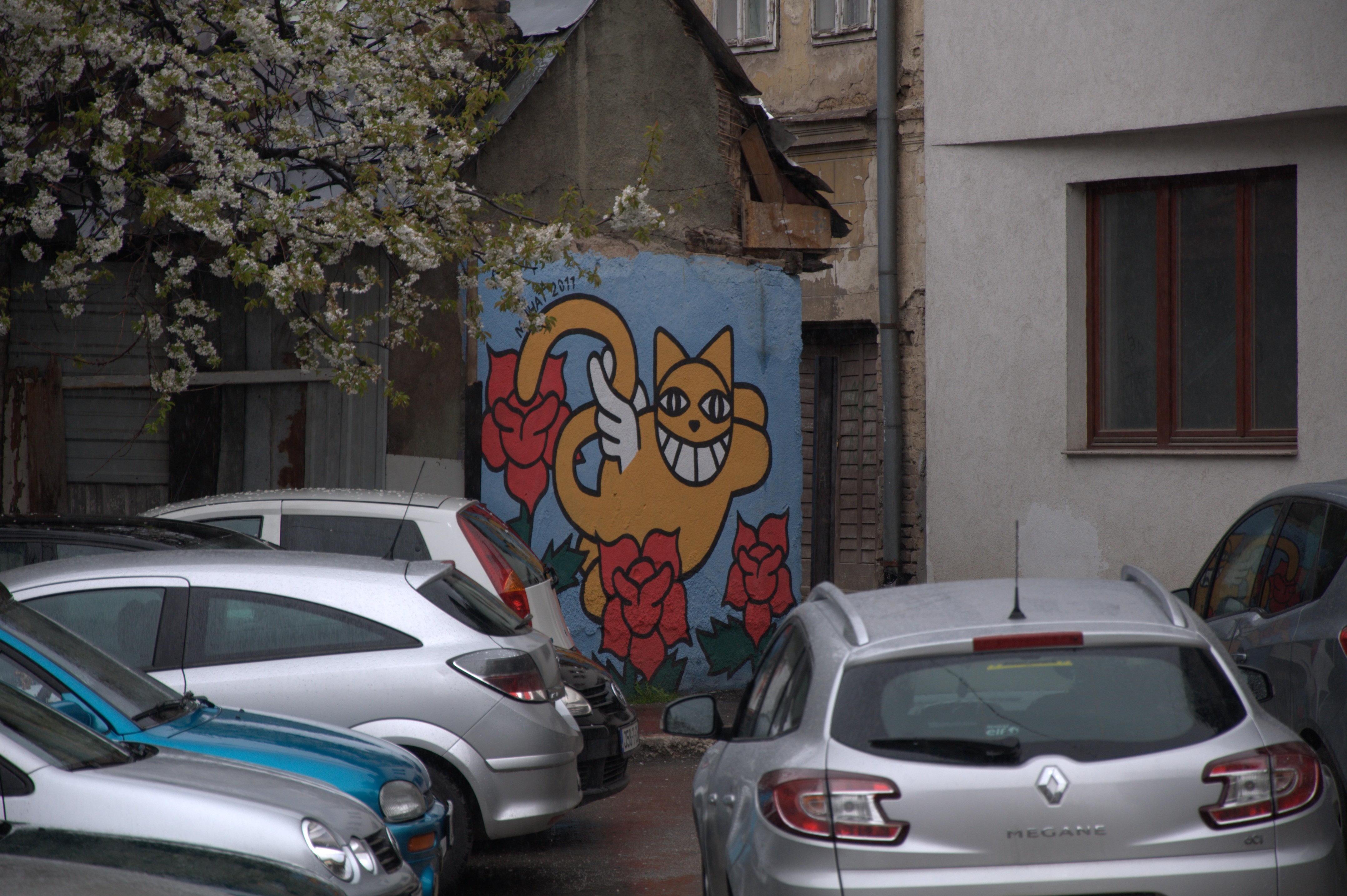 Sarajevo, Bosnia and Herzegovina